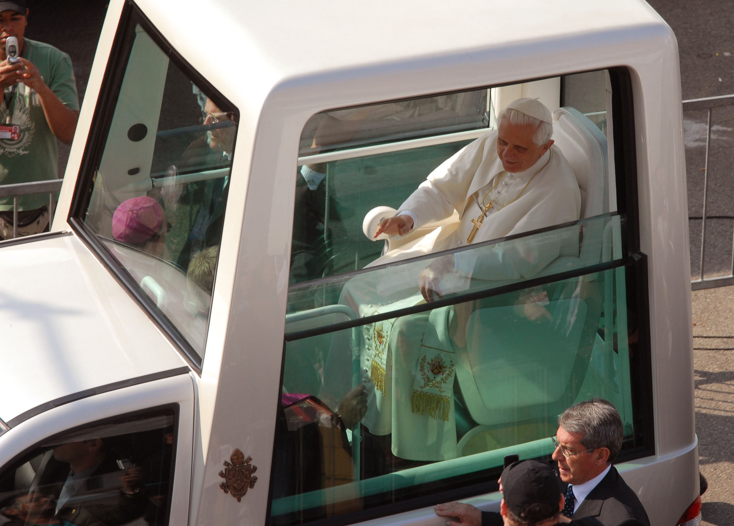 Papa Bento XVI durante missa na Basílica de Nossa Senhora Aparecida, no interior do estado de São Paulo, Brasil.